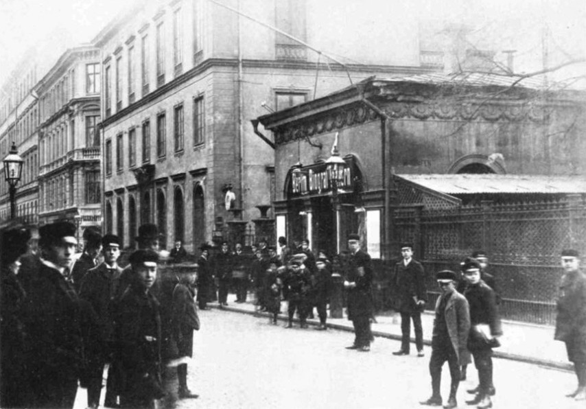 Berlin-Biograf-teatern i tidigare Davidsons paviljonger. Vänster därom Apoteket Nordstjernan - byggnadsår 1855. Arkitekt Johan Fredrik Åbom